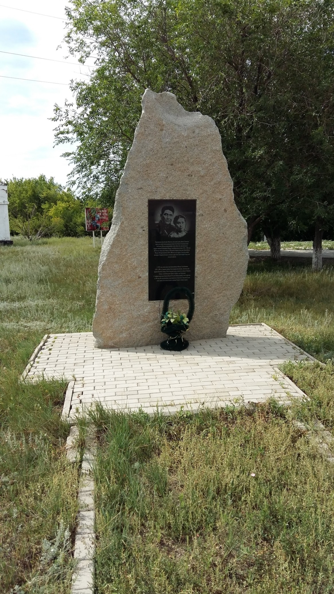 Понятник супругам Кошкумбаевым